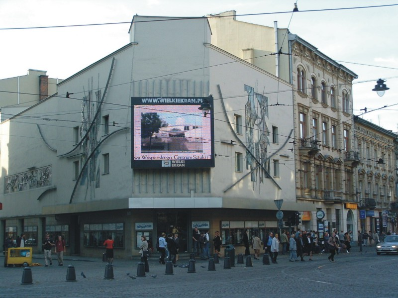 teatr Bagatela w Krakowie 23-10-2004r.